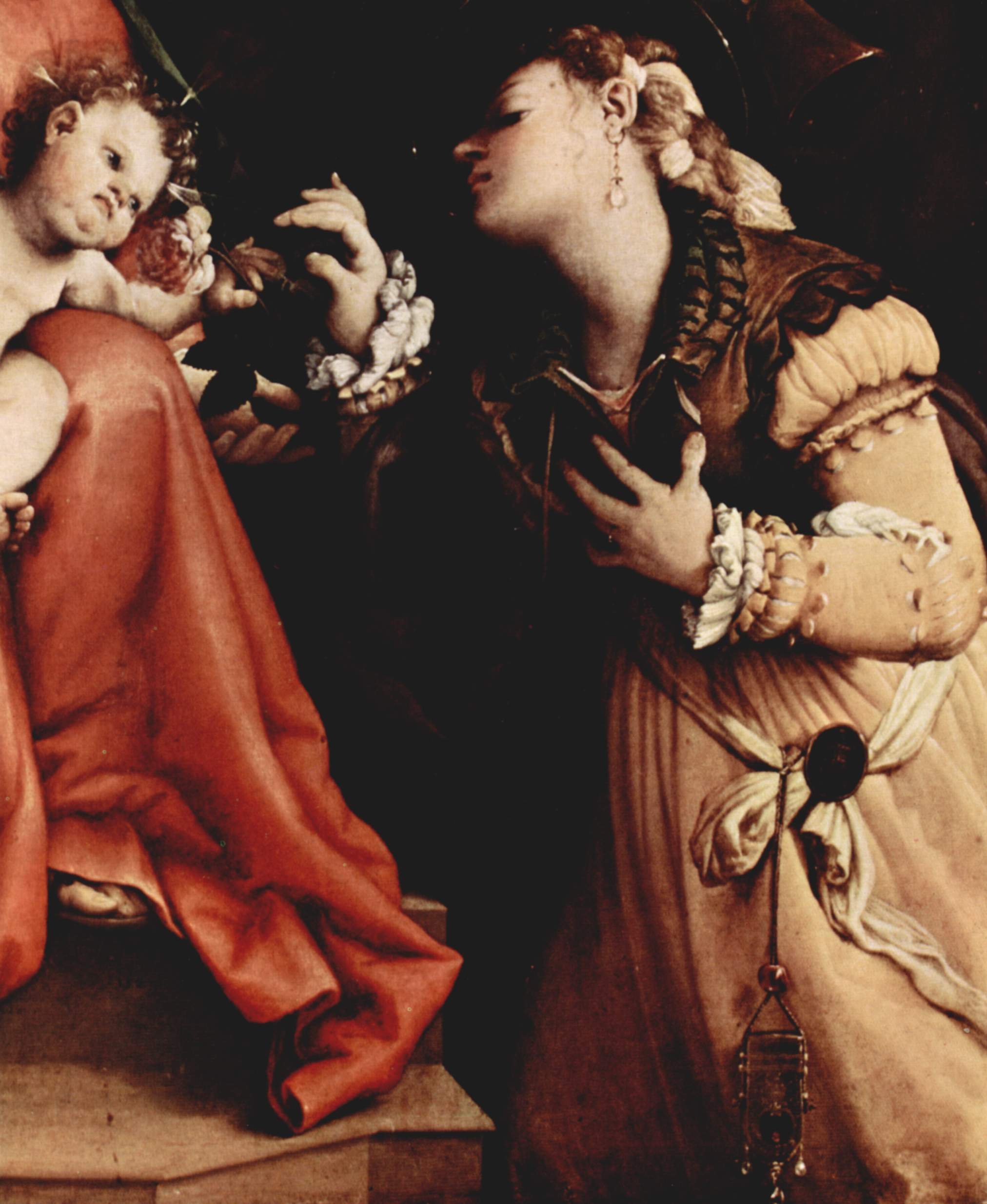 detail